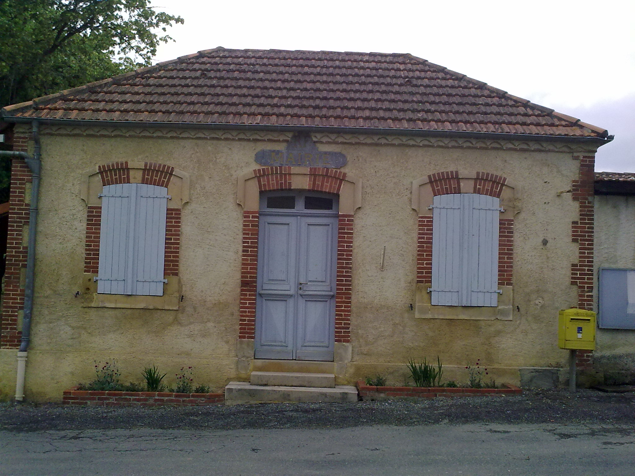 Aydie